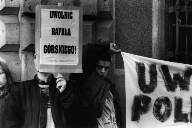 Fotografia z pikiety na rzecz uwolnienia Rafał Górskiego.